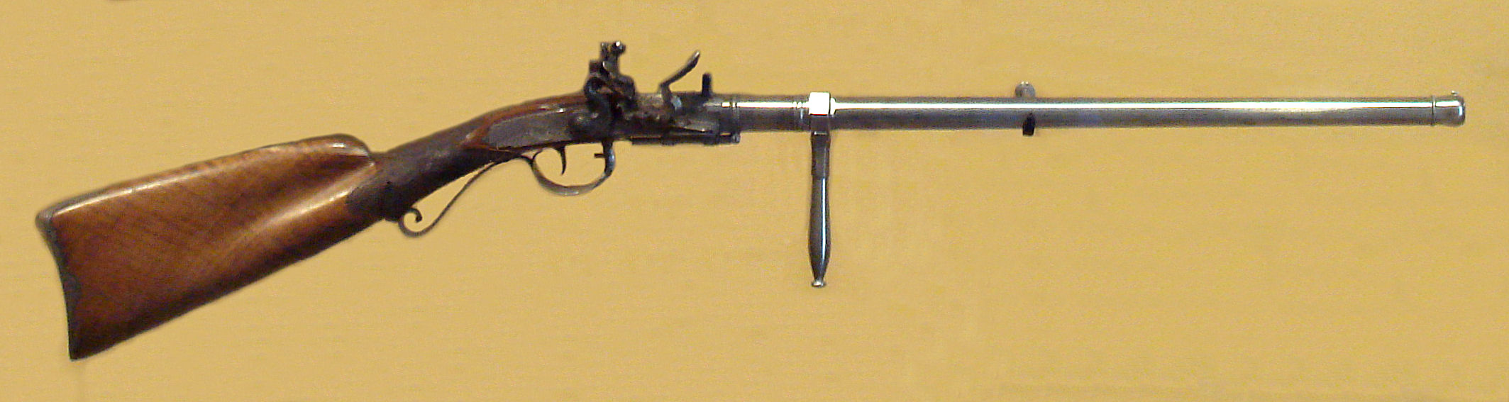 Lepage_silex_gun_dite_du_Premier_Consul_circa_1800